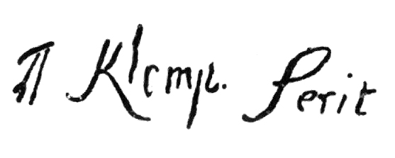 Signatur von Albert Klomp „A. Klomp fecit“ (gemalt von A. Klomp)